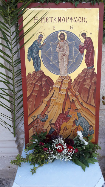 Πασαλίτες: Η εικόνα της Μεταμορφώσεως από τον ομώνυμο Ιερό Ναό